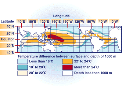 Temperaturunterschiede zwischen der Oberfläche und 1000m Tiefe in den Ozeanen